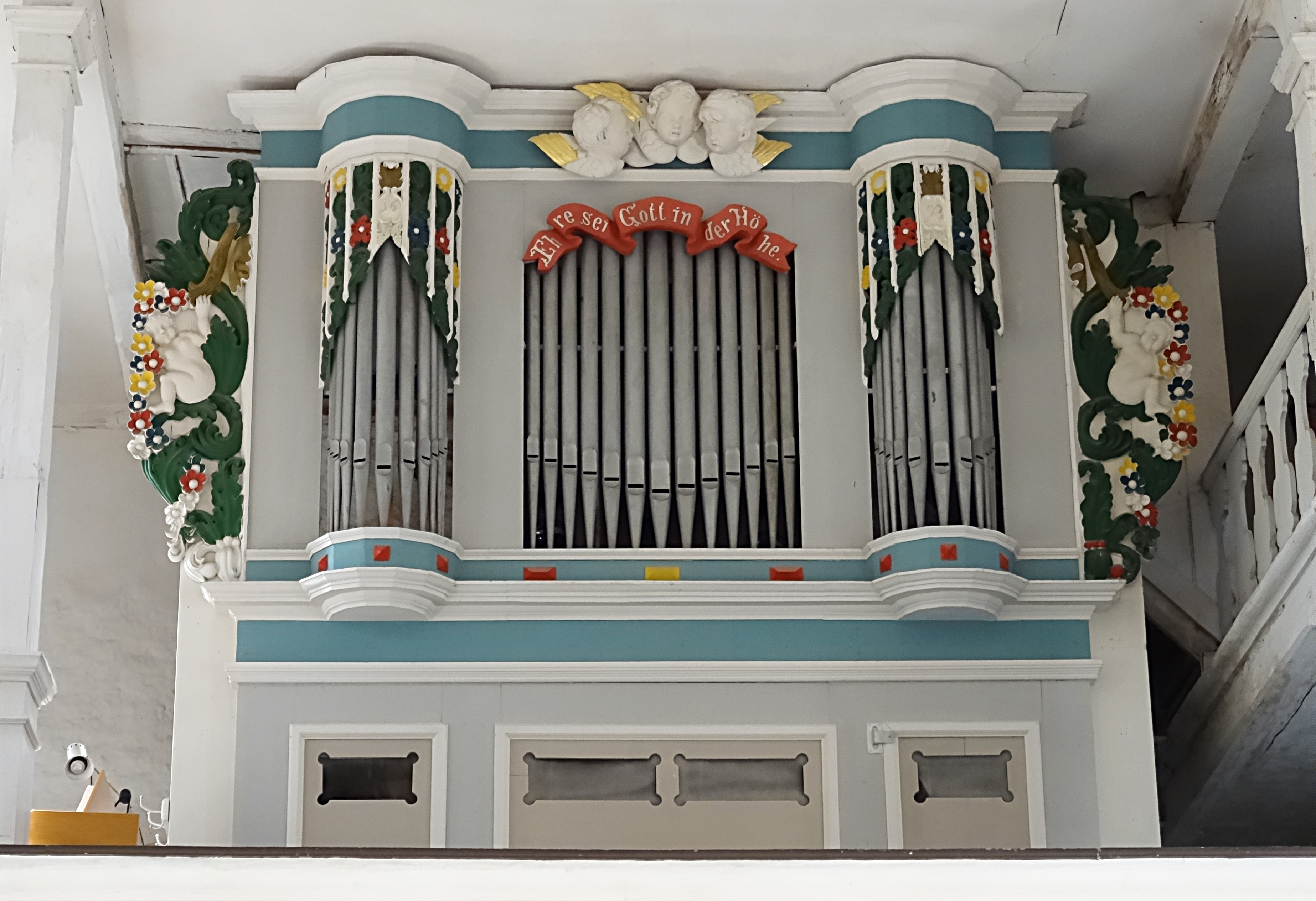 Orgel von Emil Heerwagen (1910, IIP/16) im Prospekt der Vorgängerorgel von 1693 in der Dorfkirche St. Maria und Bartholomäus Kapellendorf